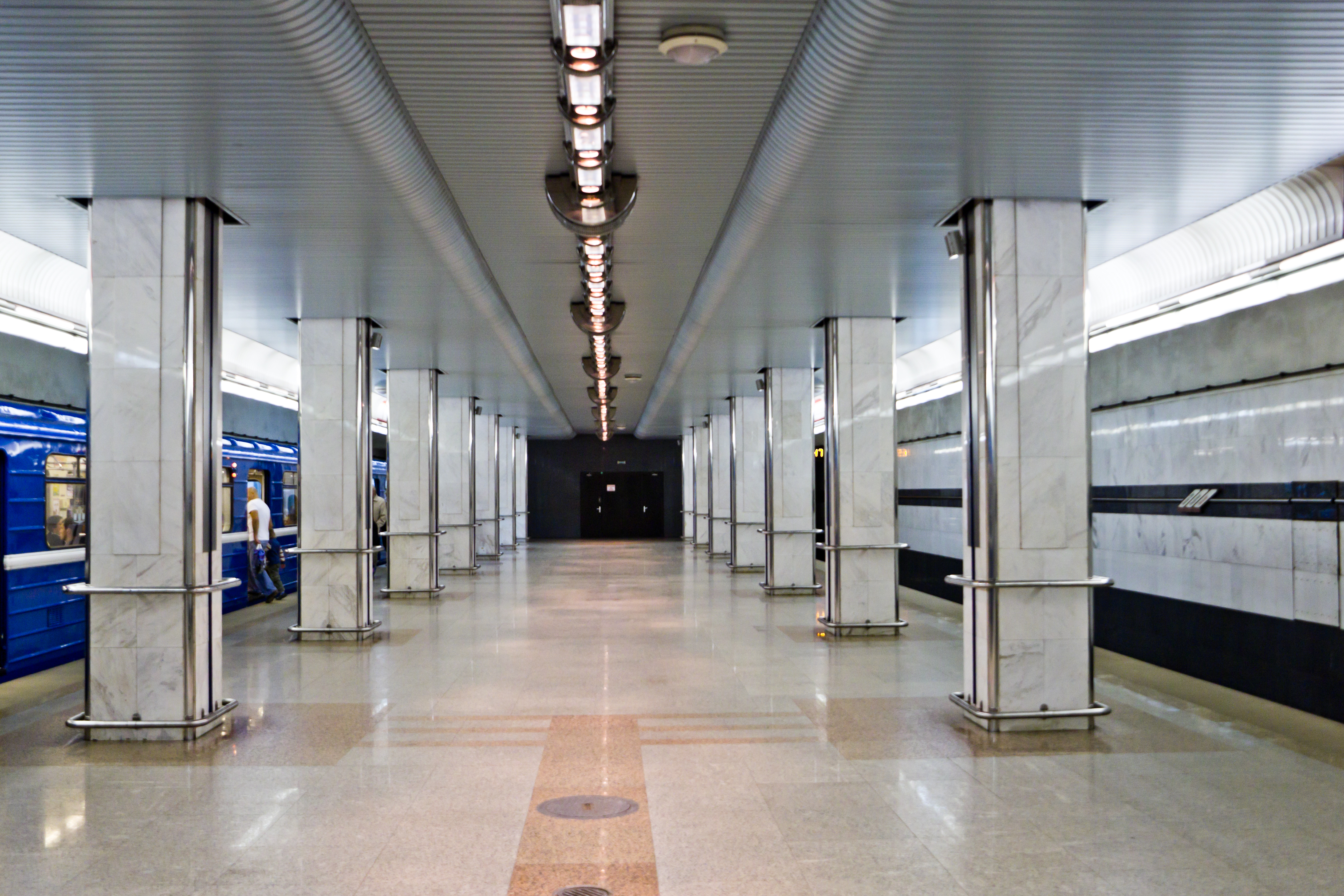 Станция метро «Спортивная», Минск